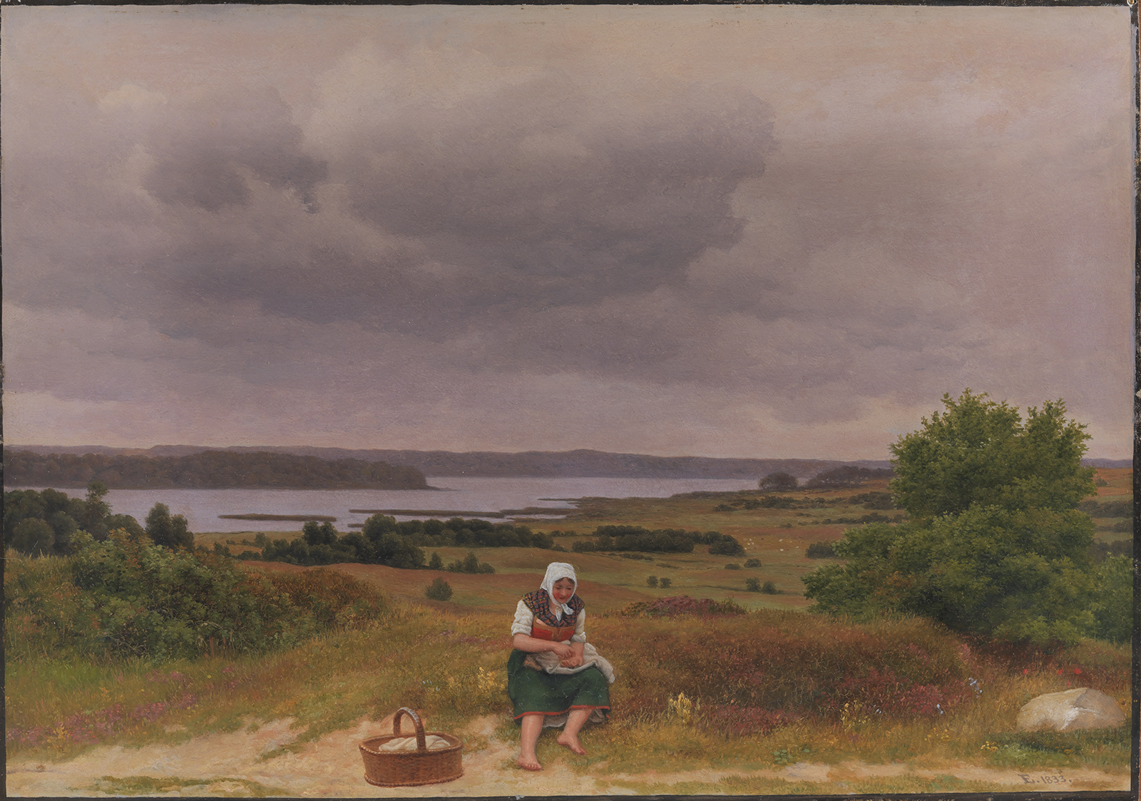 C.W. Eckersberg (1783-1853), Udsigt fra Kongevejen over Furesoeen i naerheden af Rudersdal, 1833. KMS4794